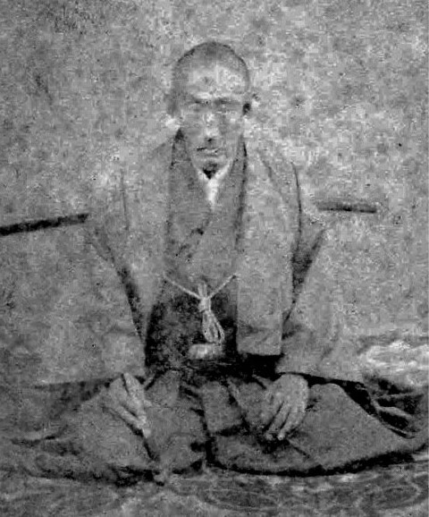 秋元志朝の肖像写真。